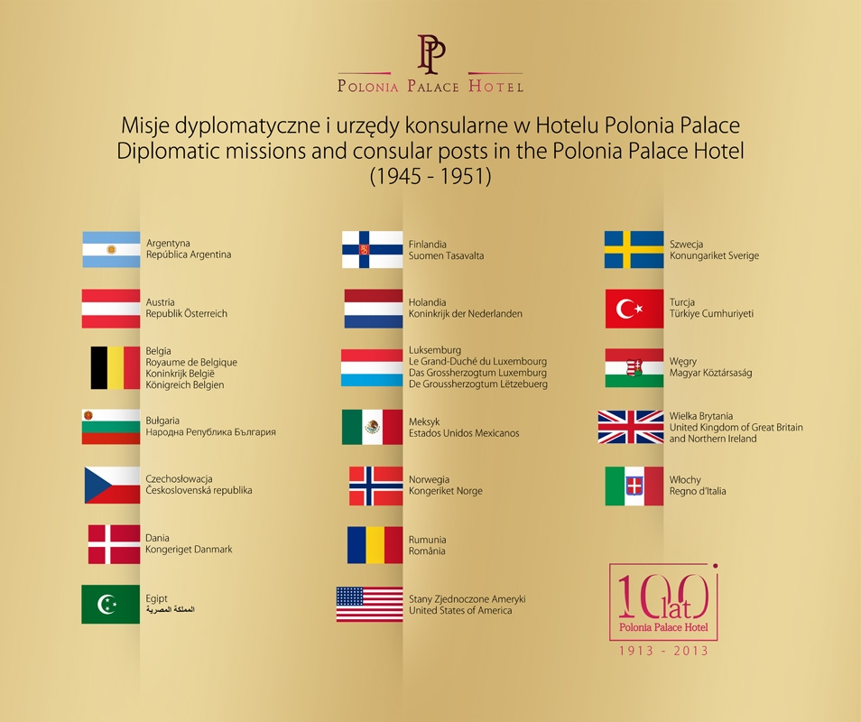 Tablica pamiątkowa w Hotelu Polonia Palace w Warszawie